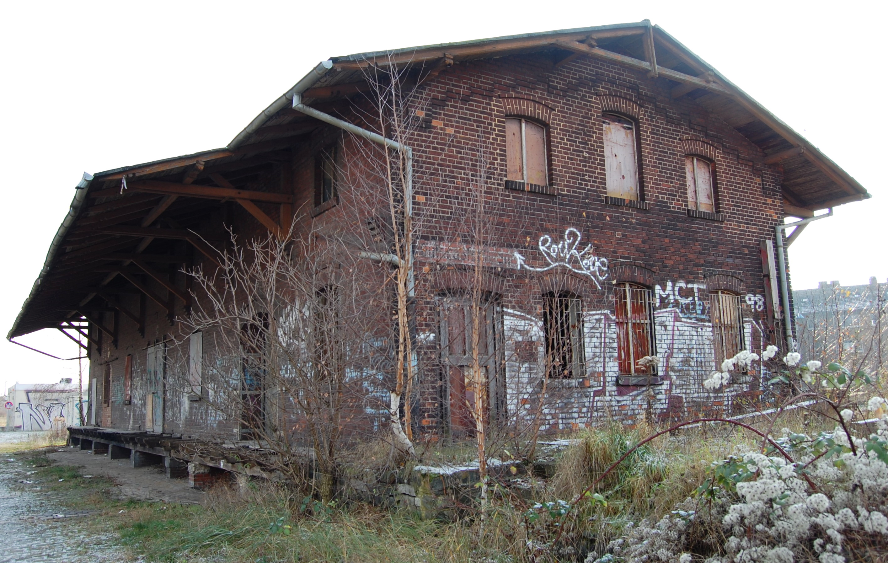 Güterschuppen, Bahnhof Magdeburg Südost